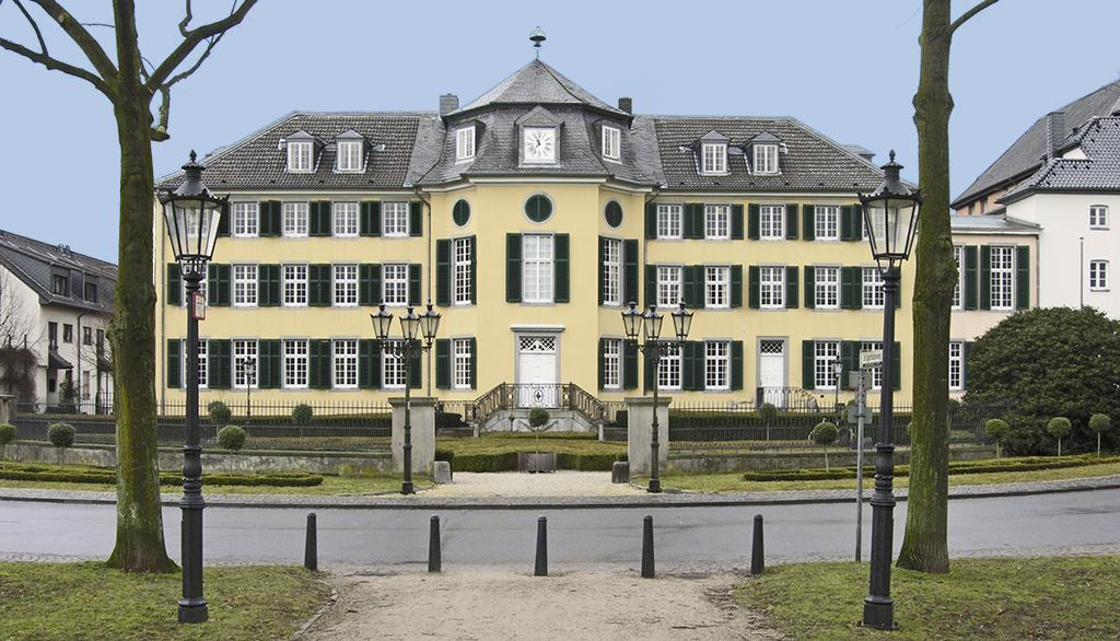 Ratingen, Industriemuseum Cromford, Herrenhaus Url